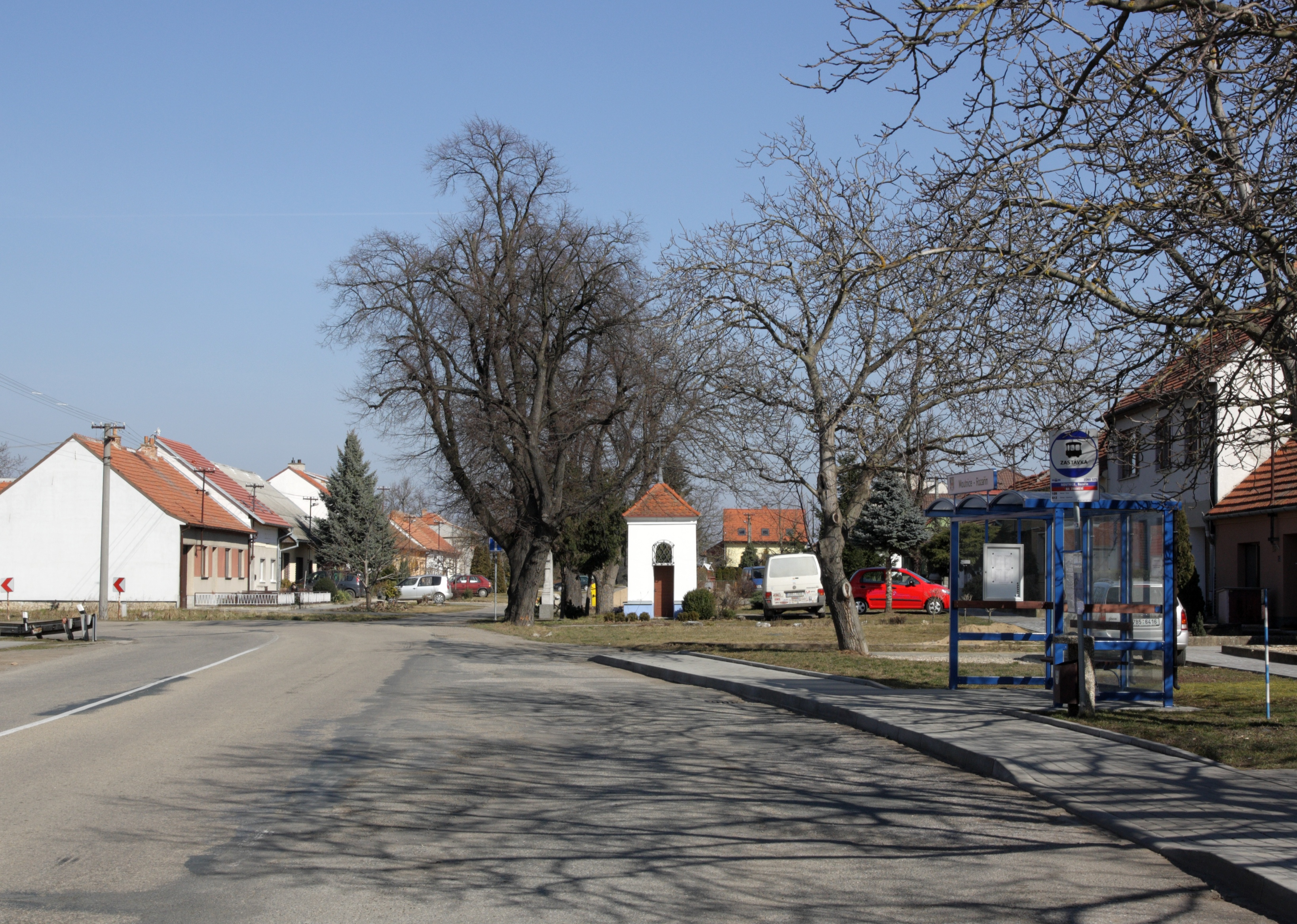 Moutnice - náves Rozařína.